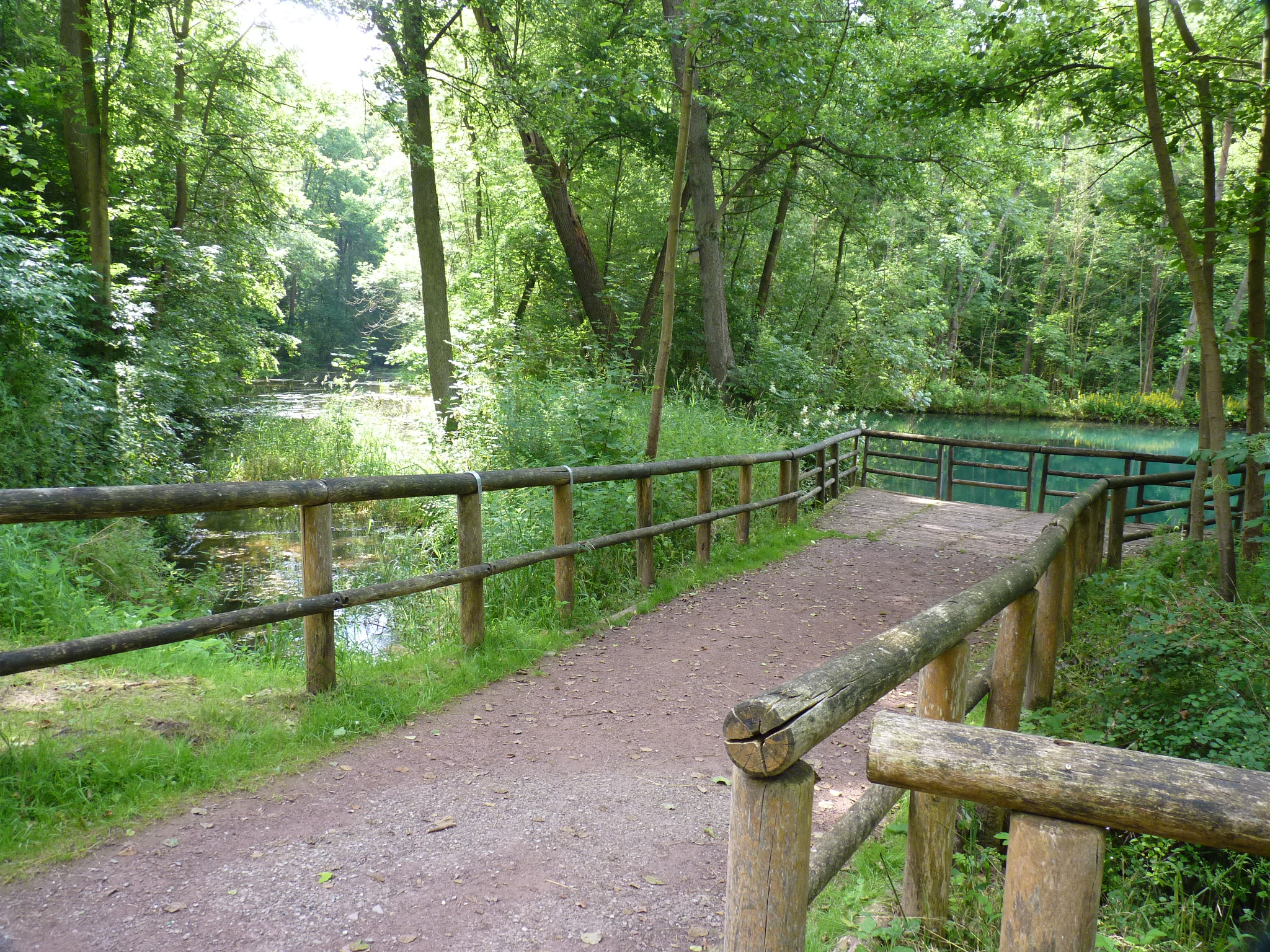 Zuweg zur Rhumequelle, im Hintergrund blauer Quelltopf